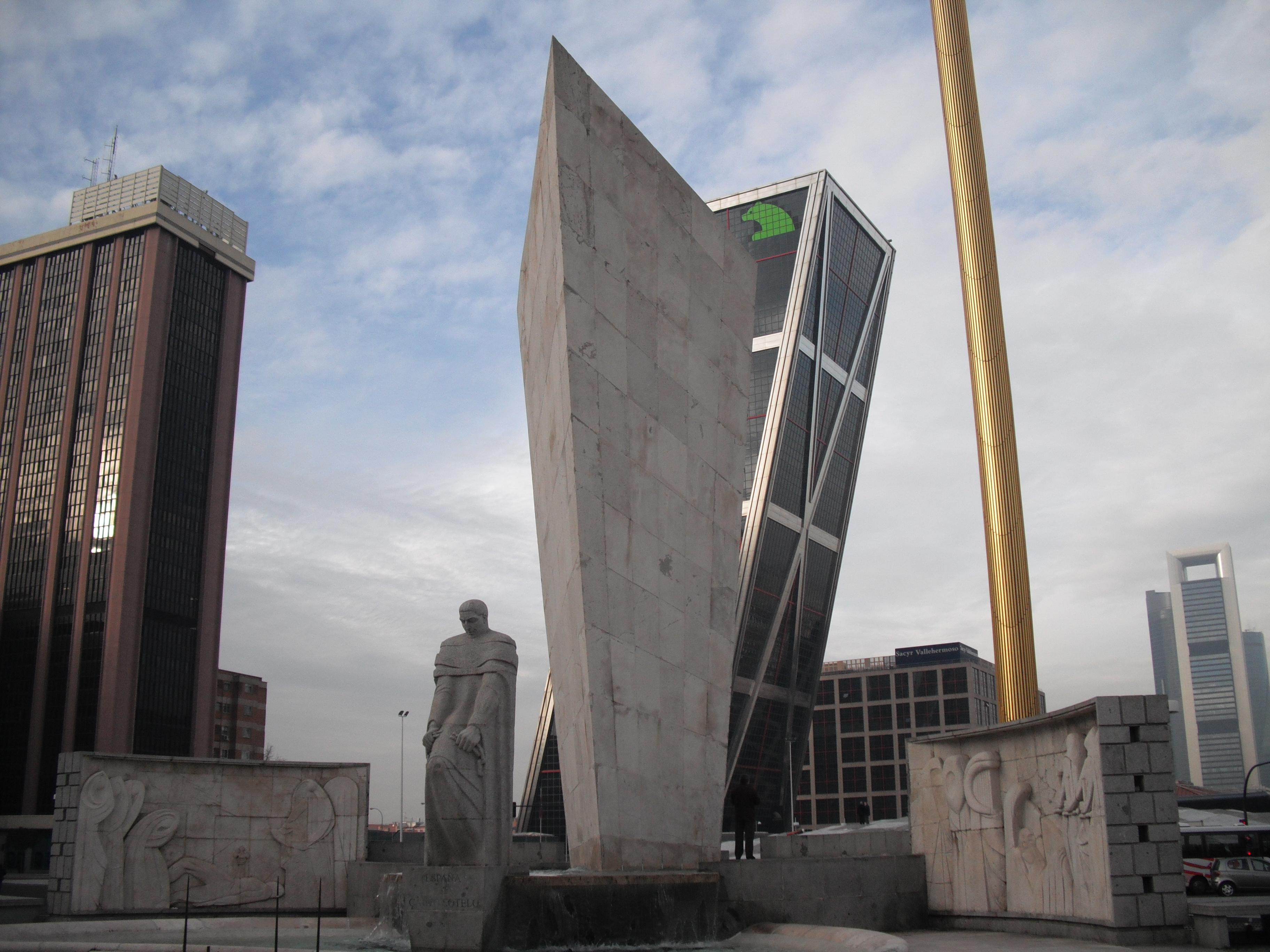 Monumento a José Calvo Sotelo. Plaza de Castilla Madrid Comunidad de Madrid España